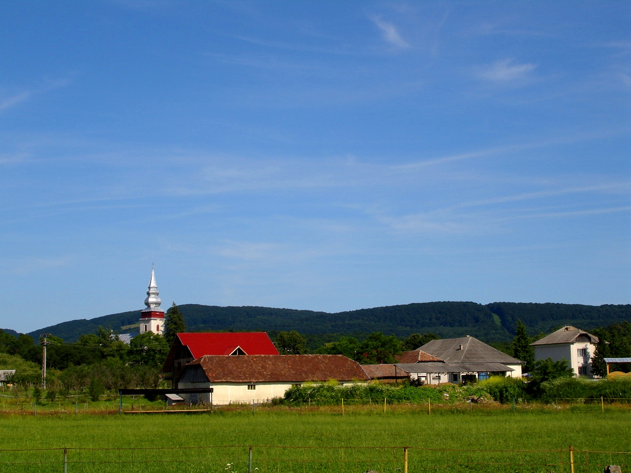 Cernesti, Maramures